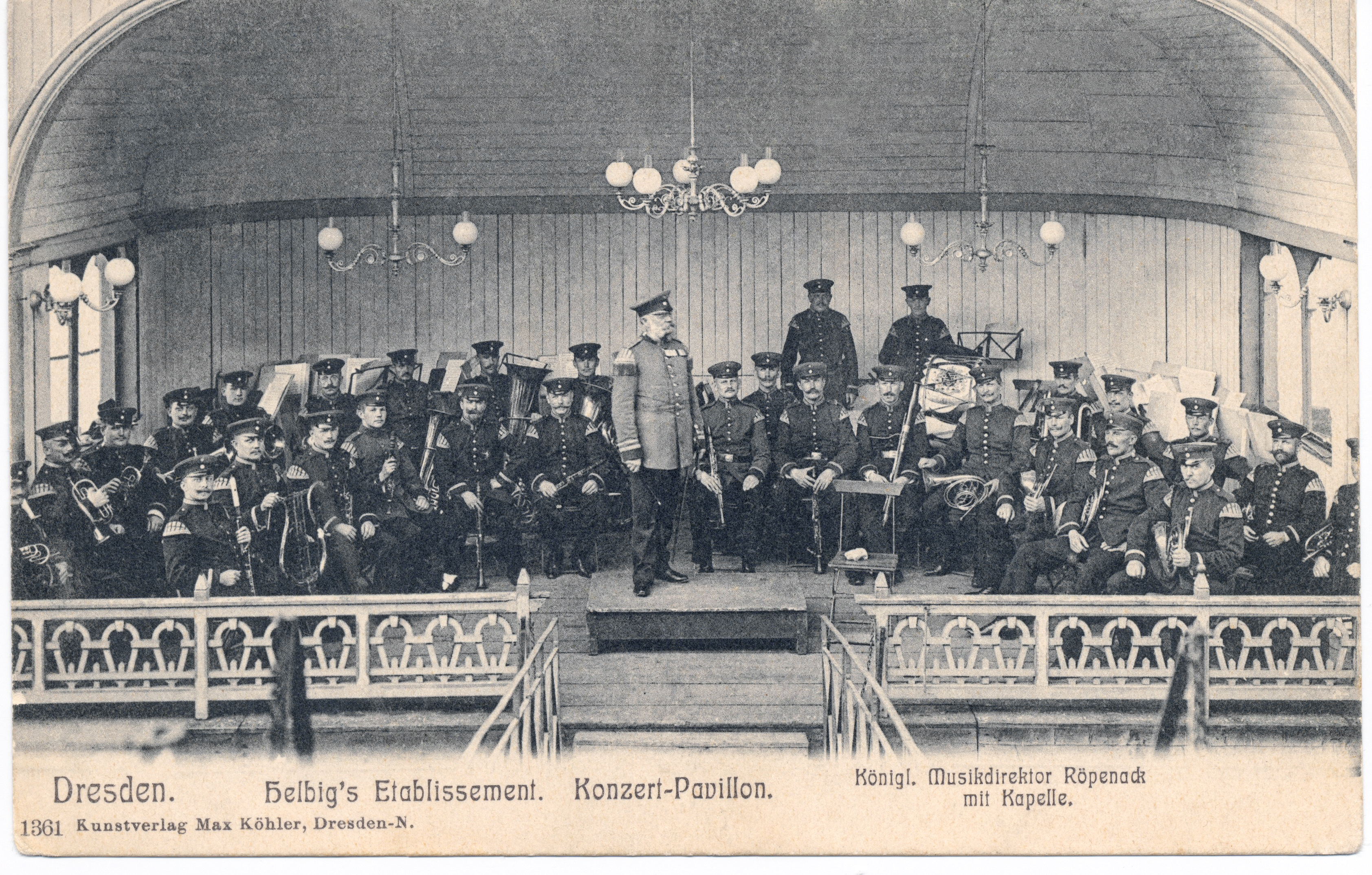 Heinrich Christoph Röpenack mit Kapelle im schwimmenden Konzertpavillion auf der Elbe in Höhe der Semperoper, 1905